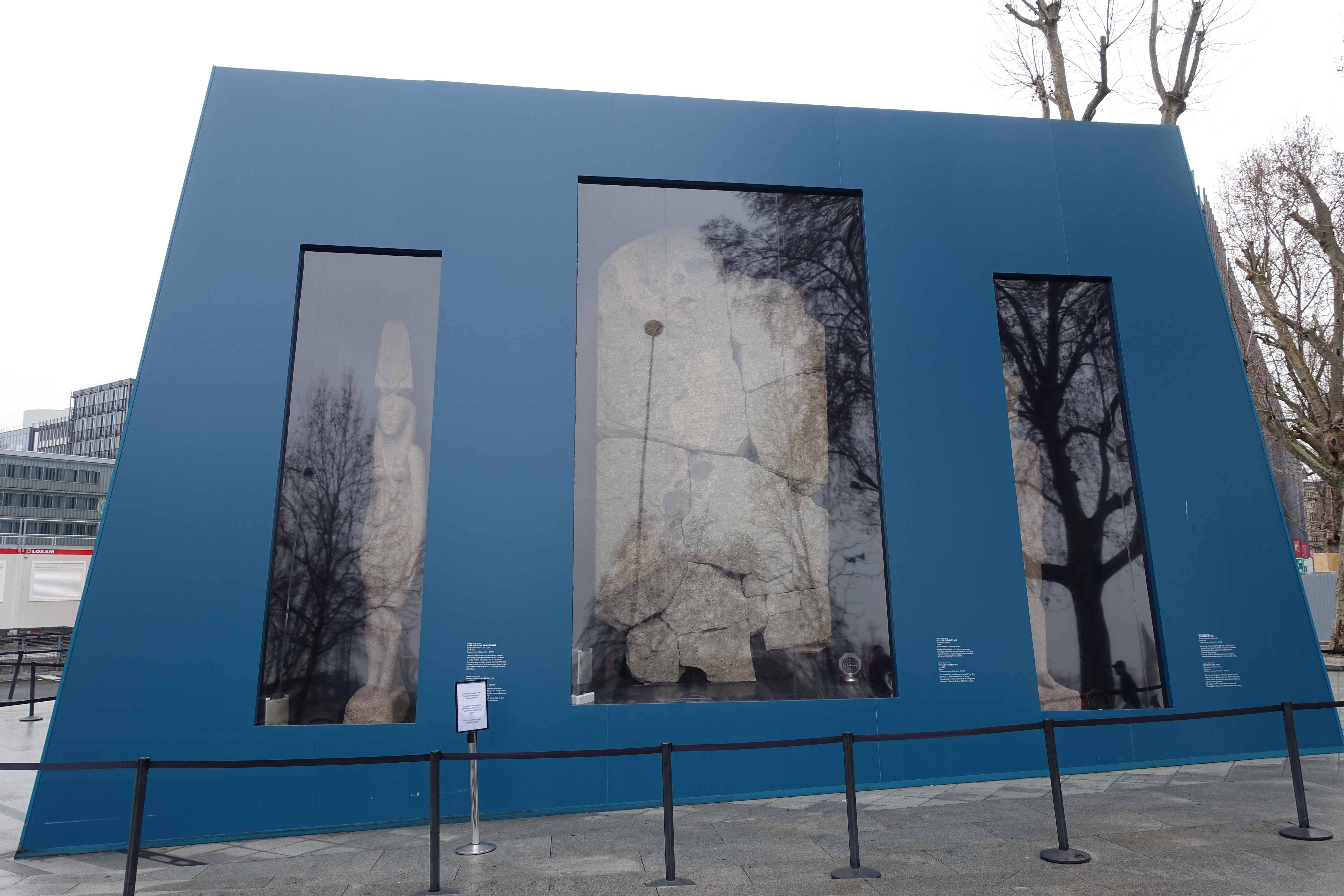 Osiris, mystères engloutis d'Égypte exhibition, Institut du Monde Arabe, Paris